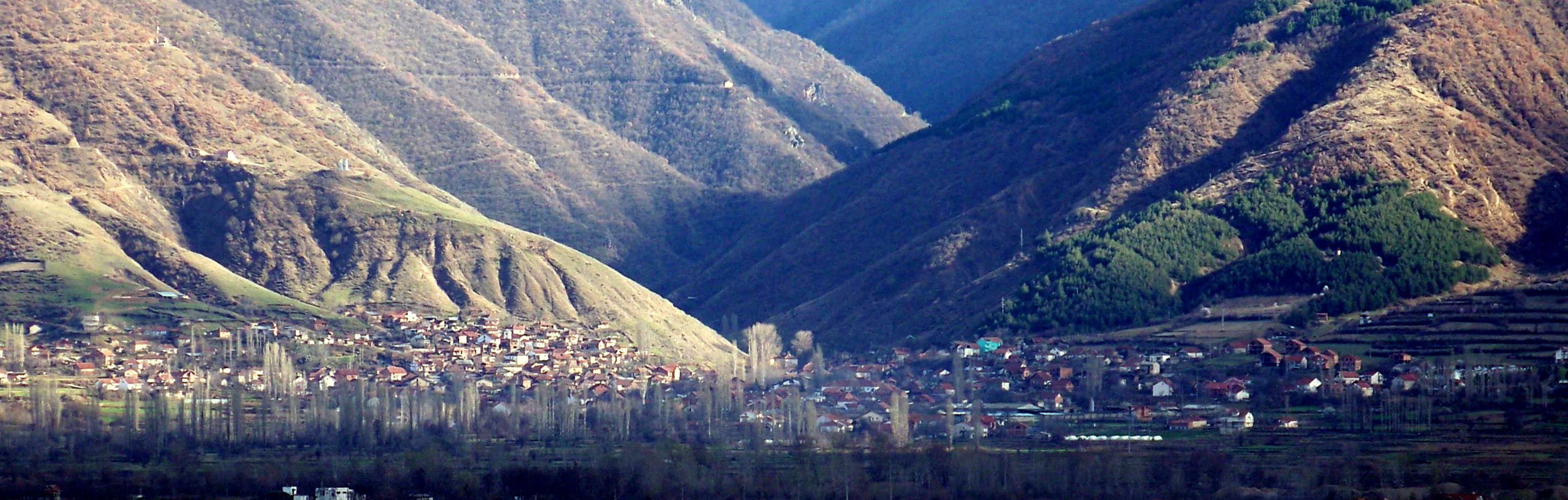 Поглед на Зрновци